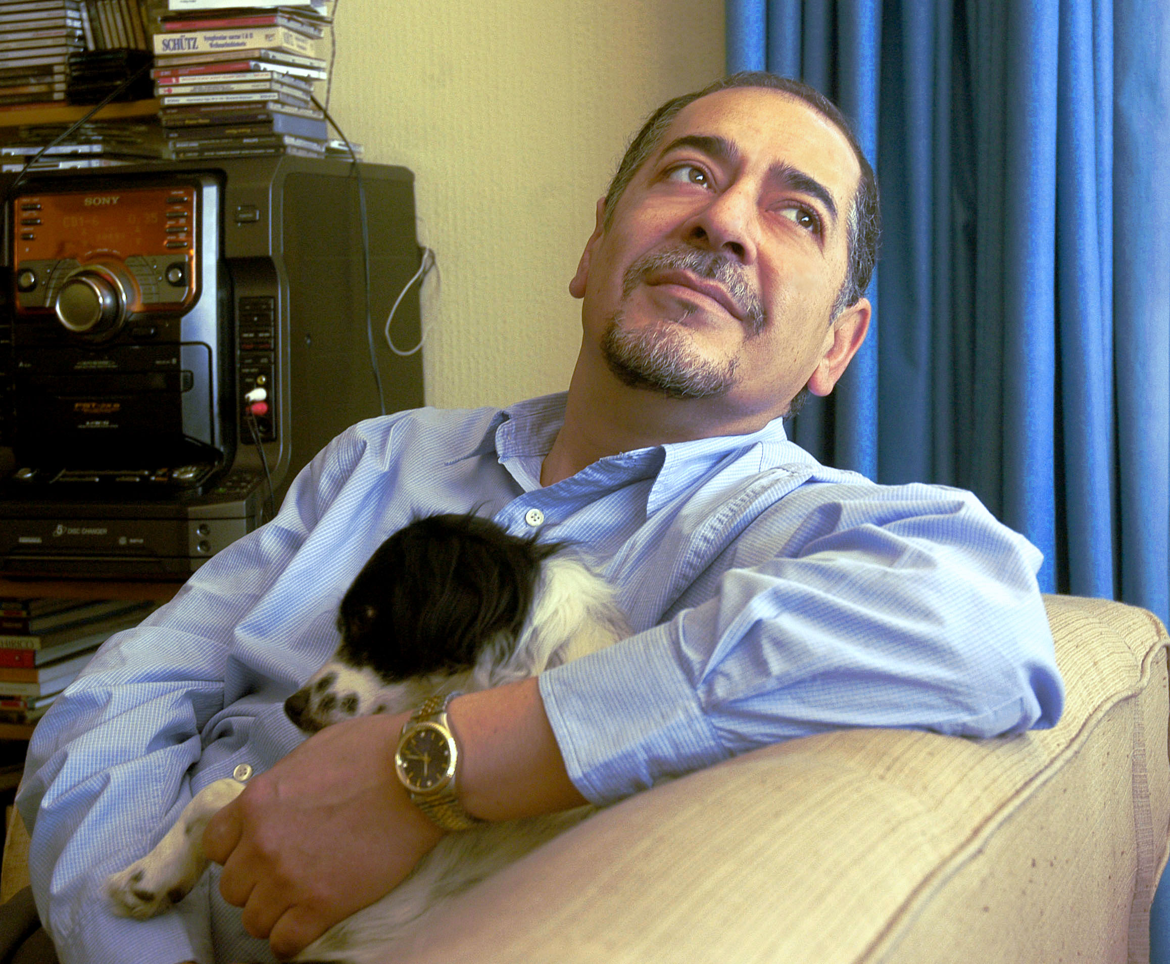 Foto de Carlos Iturra, escritor